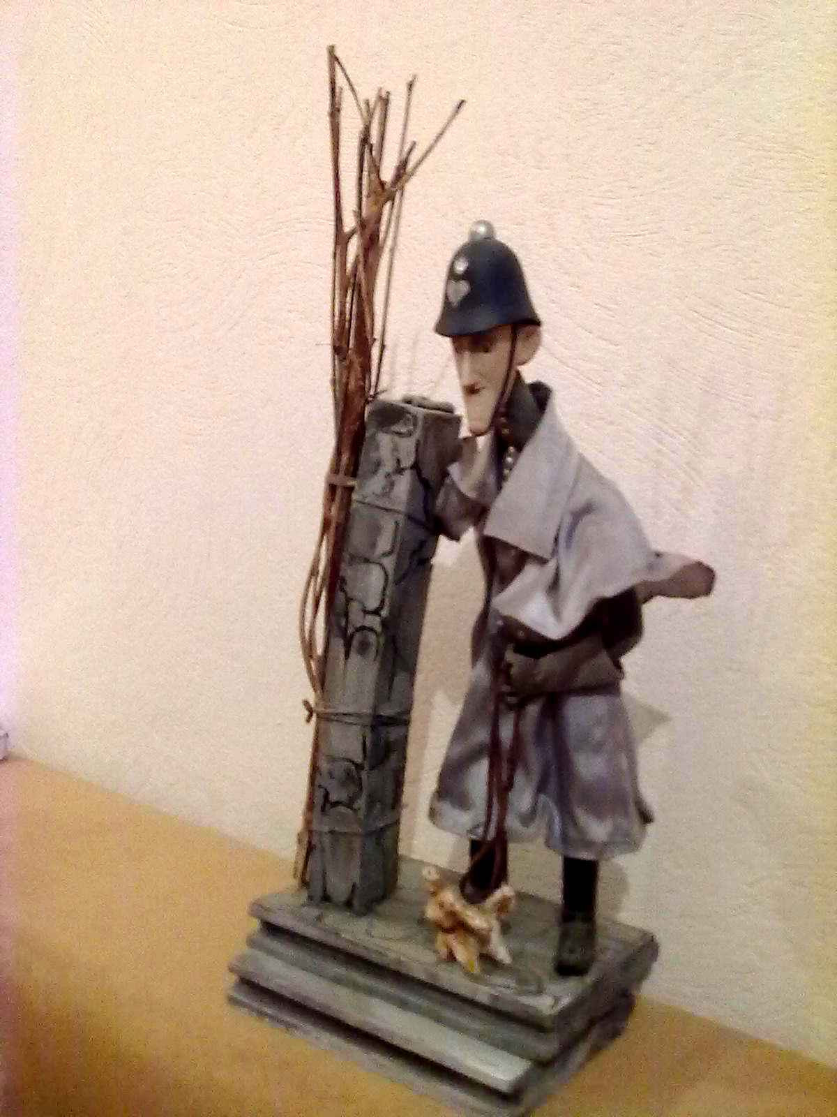 Макет куклы из анимационного фильма "Несколько страниц из жизни приведений", реж. Марина Новогрудская, 1993. Макет находится в личной коллекции режиссёра.